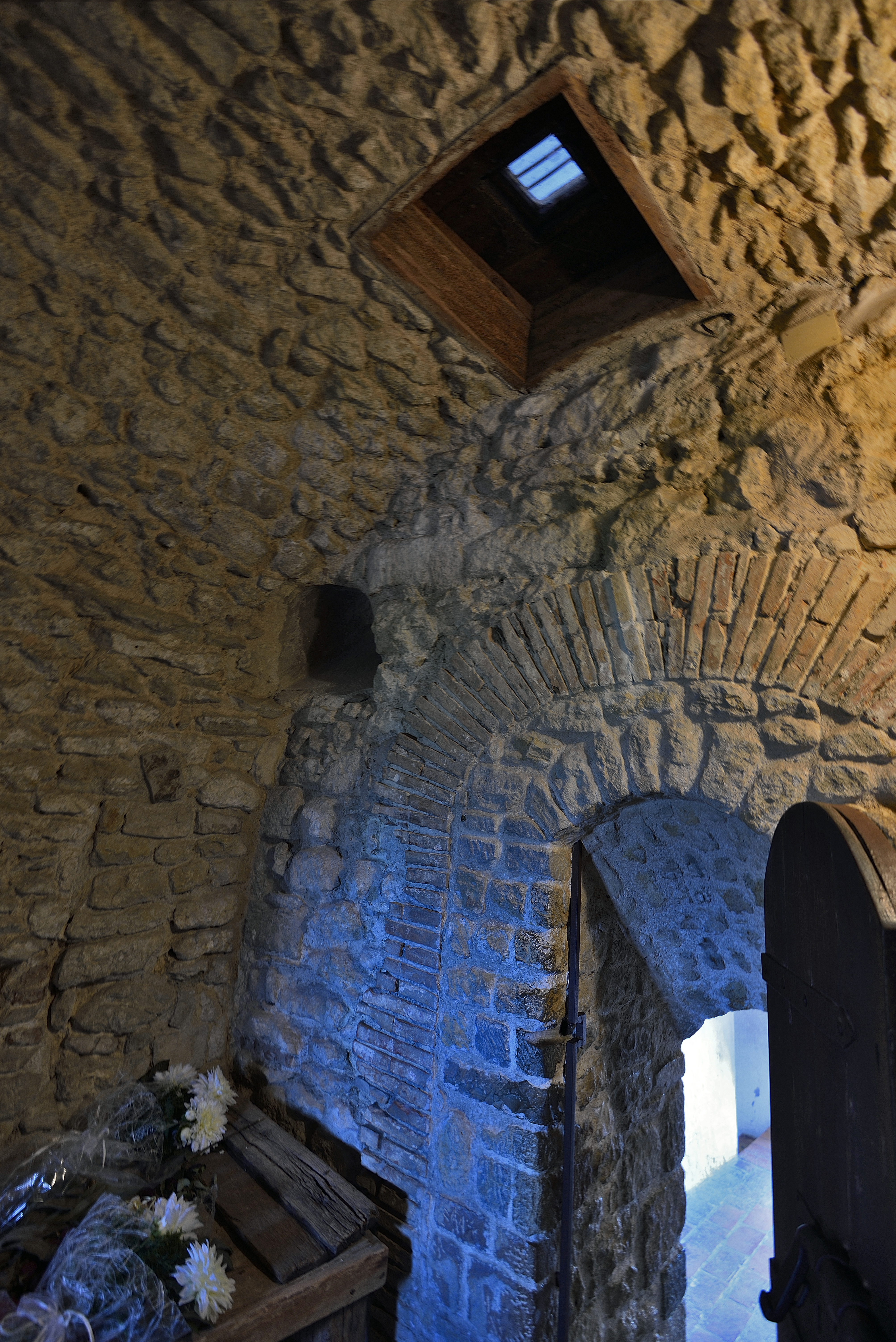 Forte di San Leo This is a photo of a monument which is part of cultural heritage of Italy.